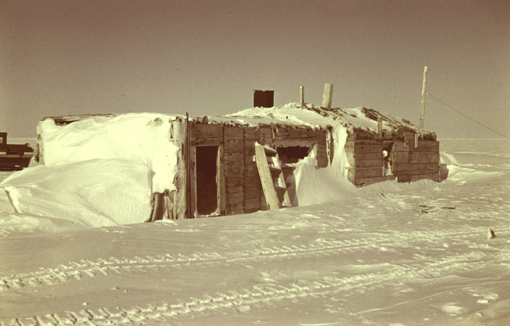 [Ernest de Koven] Leffingwell's Flaxman Island Base - in use 1909–1911